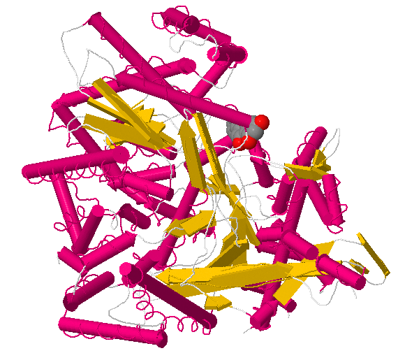 He hecho una foto de la estructura de la enzima en su estructura secundaria en la pagina web del protein explorer.